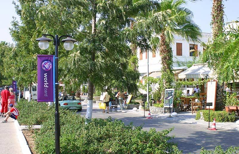 Srpskohrvatski / српскохрватски: Ulica u centru Bodruma.